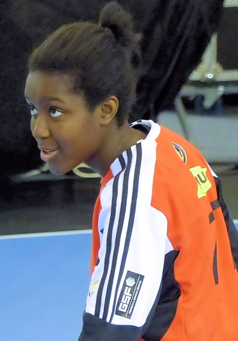 Maryam Garba, gardienne dans le club Issy Paris Hand. Le 14 mai 2014.